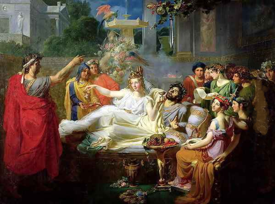 Felix auvray 1800-1833 Épée de Damoclès